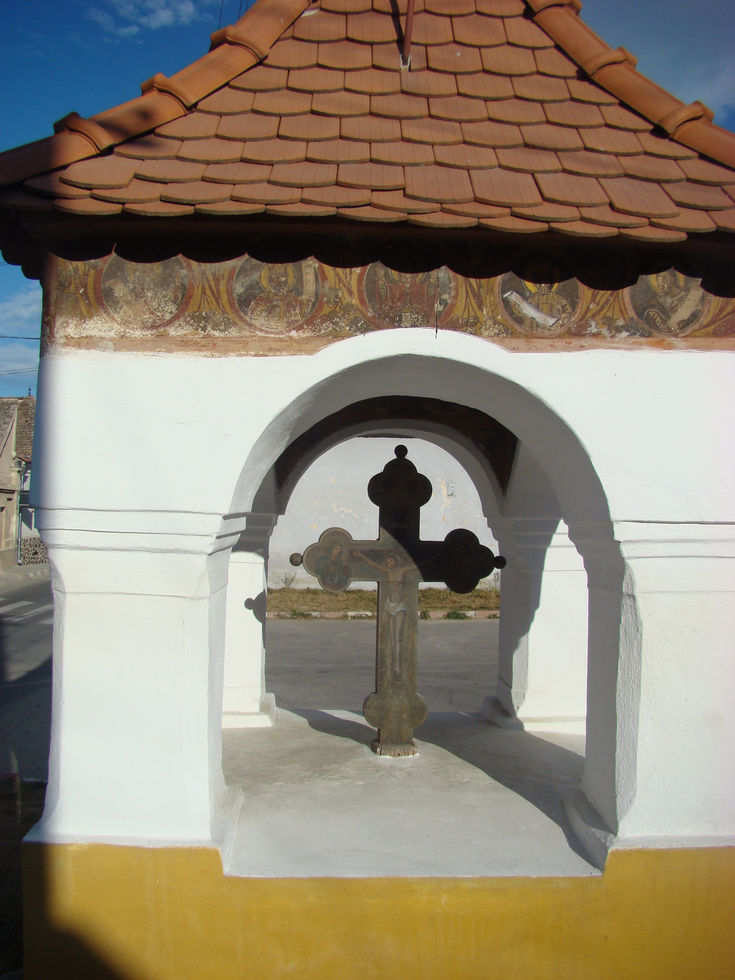 Troiţă